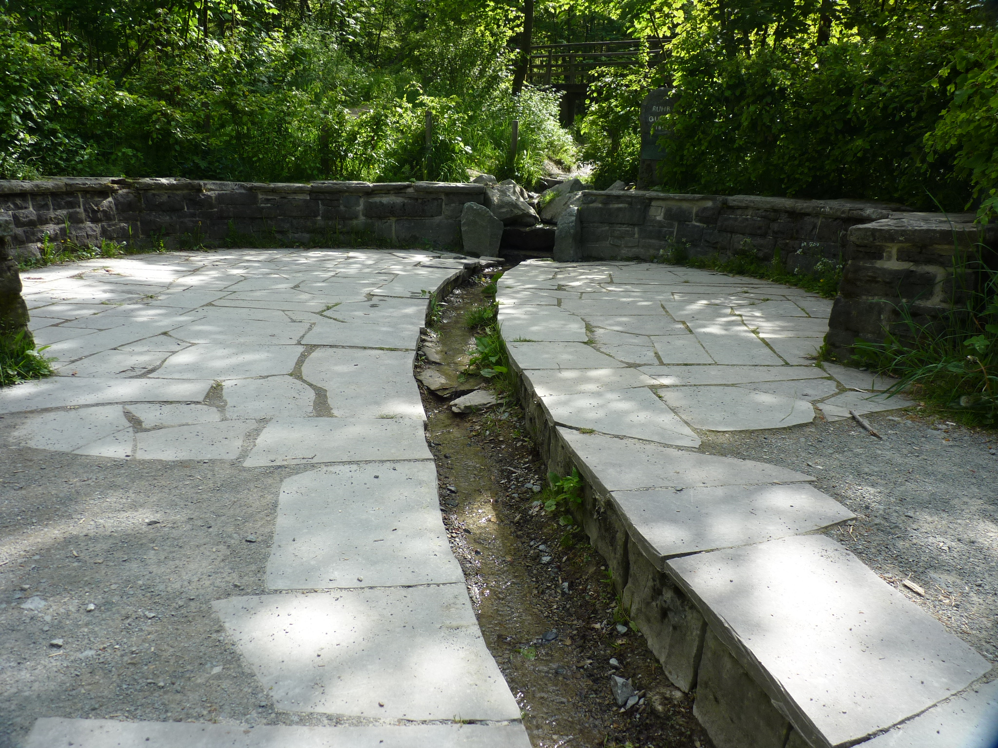 Das Rondell knapp unterhalb der Ruhrquelle